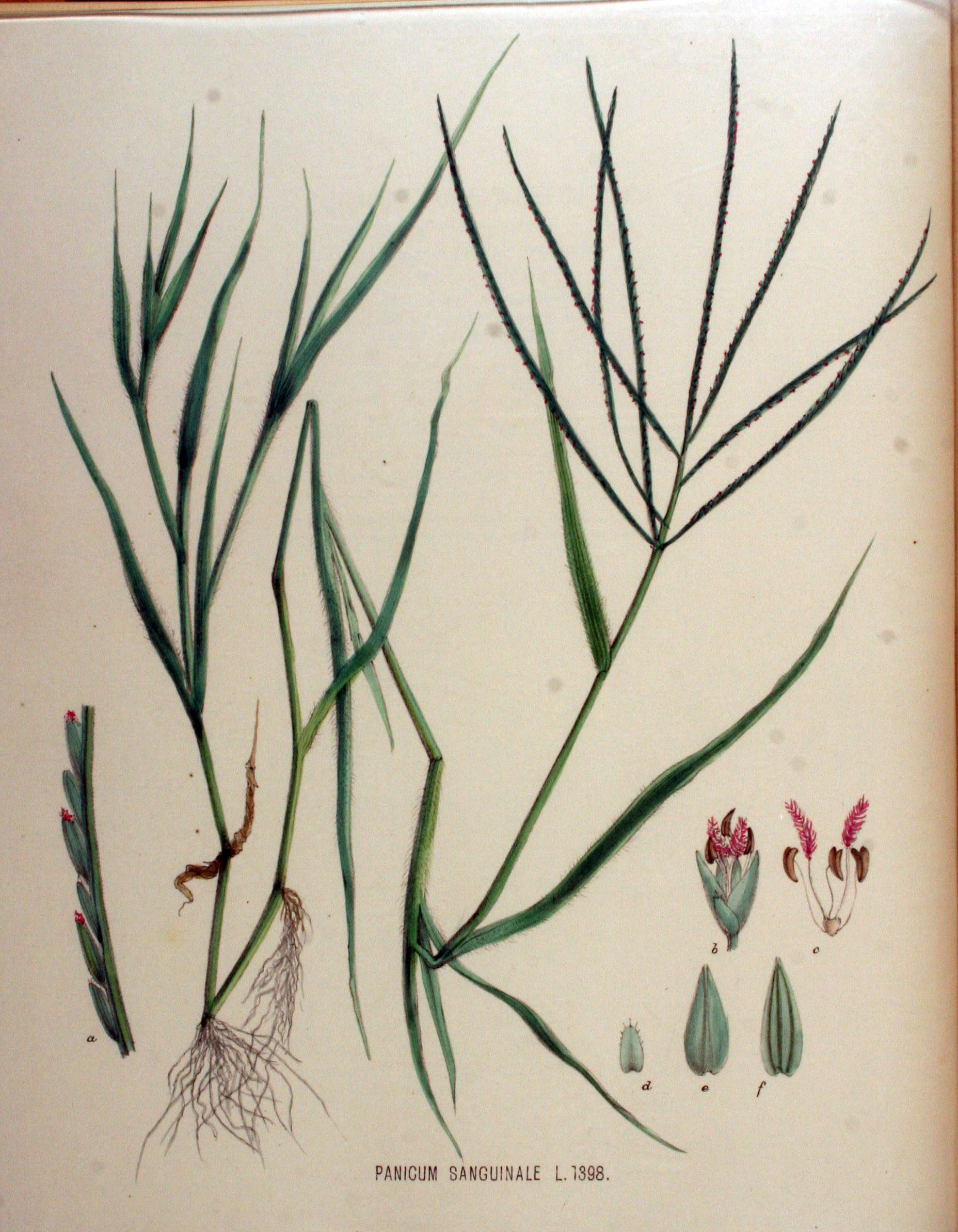 Digitaria sanguinalis (L.) Scop. (Syn. Panicum sanguinale L.)